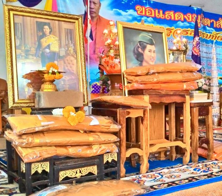 พิธีขอบรรพชา สามเณรภาคฤดูร้อน พ.ศ.๒๕๕๘ ณ.วัดไตรสิริมงคล บ้านซับตะคร้อ ต.ไทยเจริญ อ.หนองบุญมาก จ.นครราชสีมา